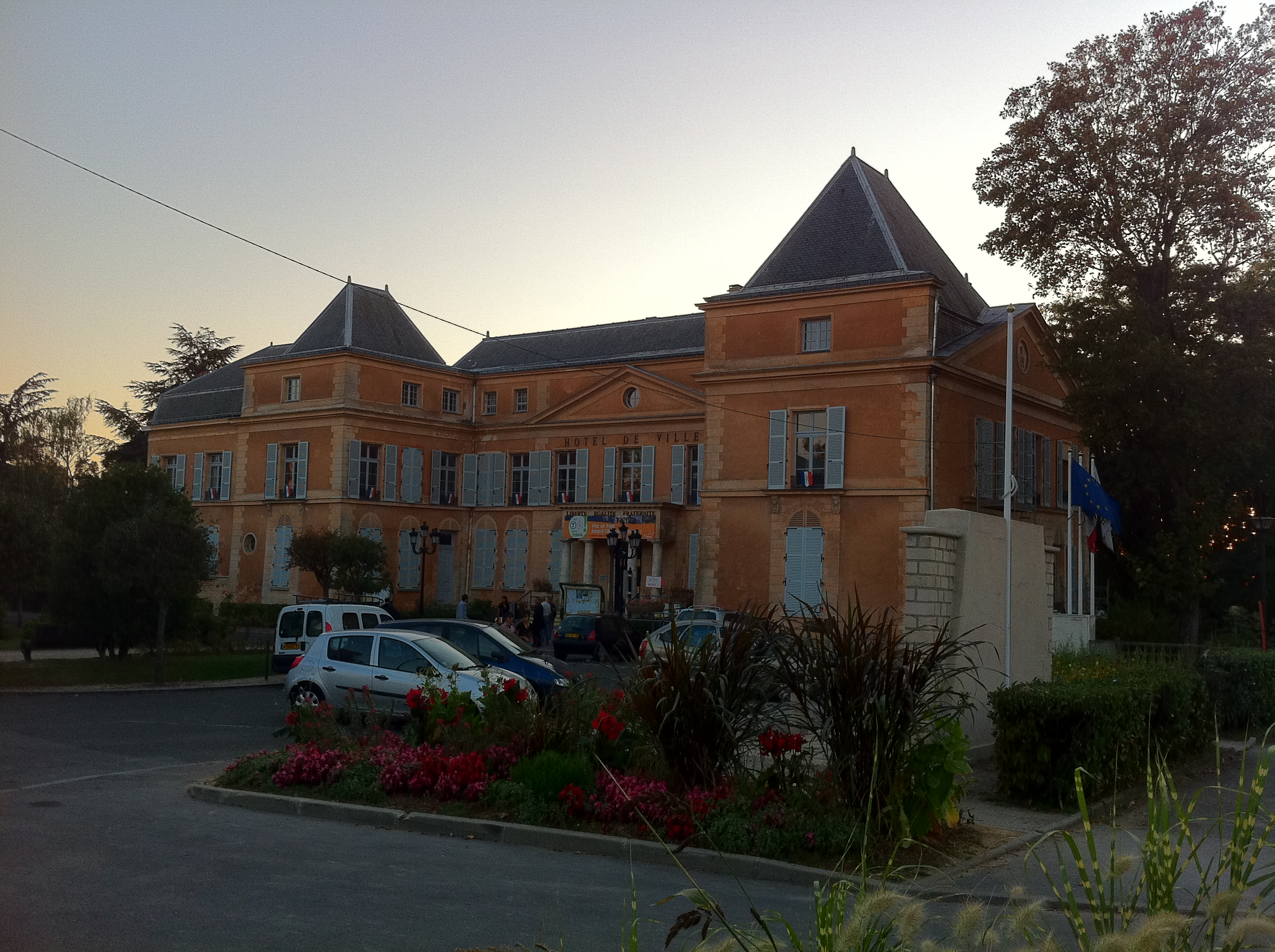 Mairie de Clichy, prise le 03 octobre 2011.